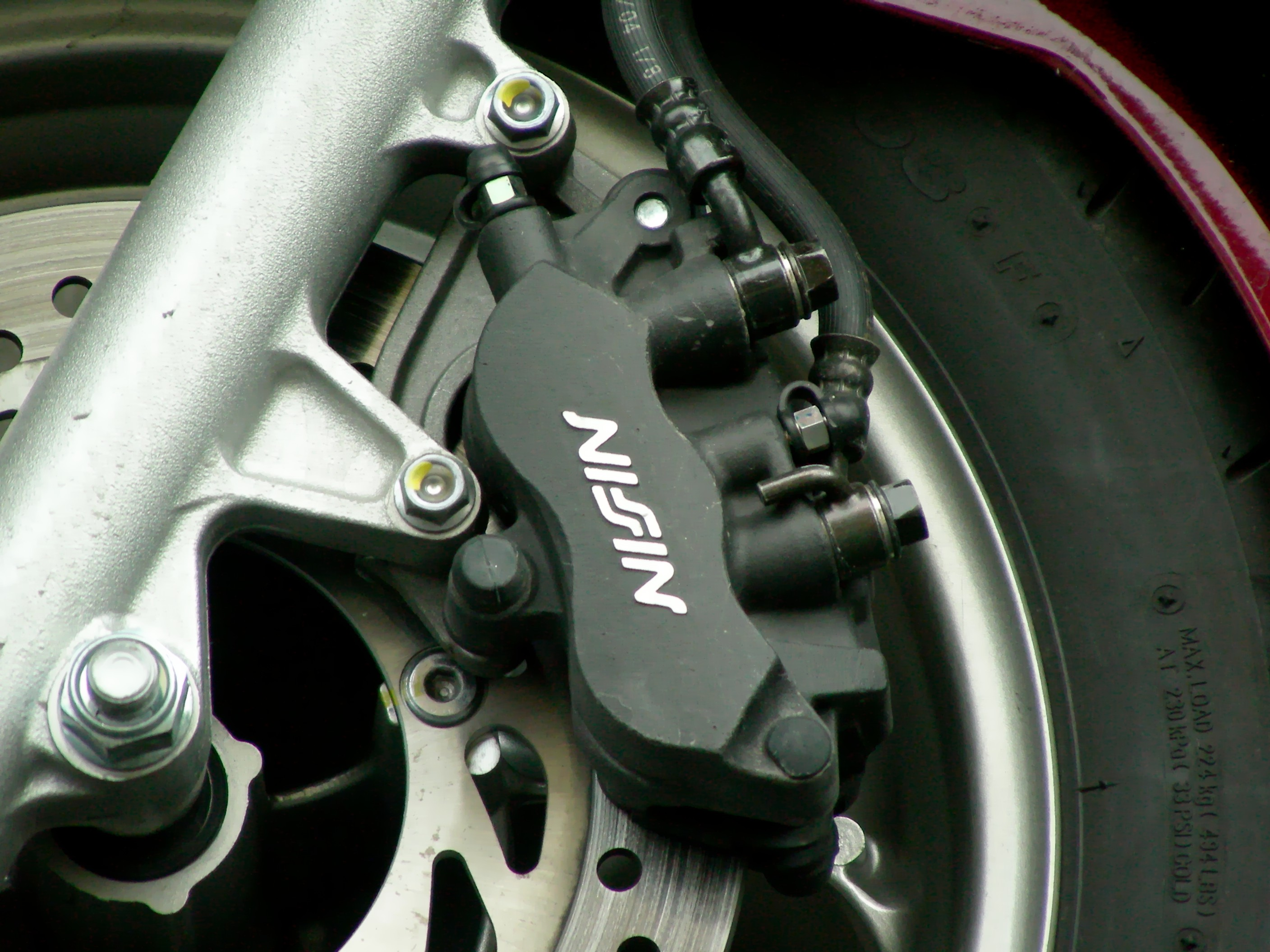 3 Kolben Brems Zange bei Honda_CBS